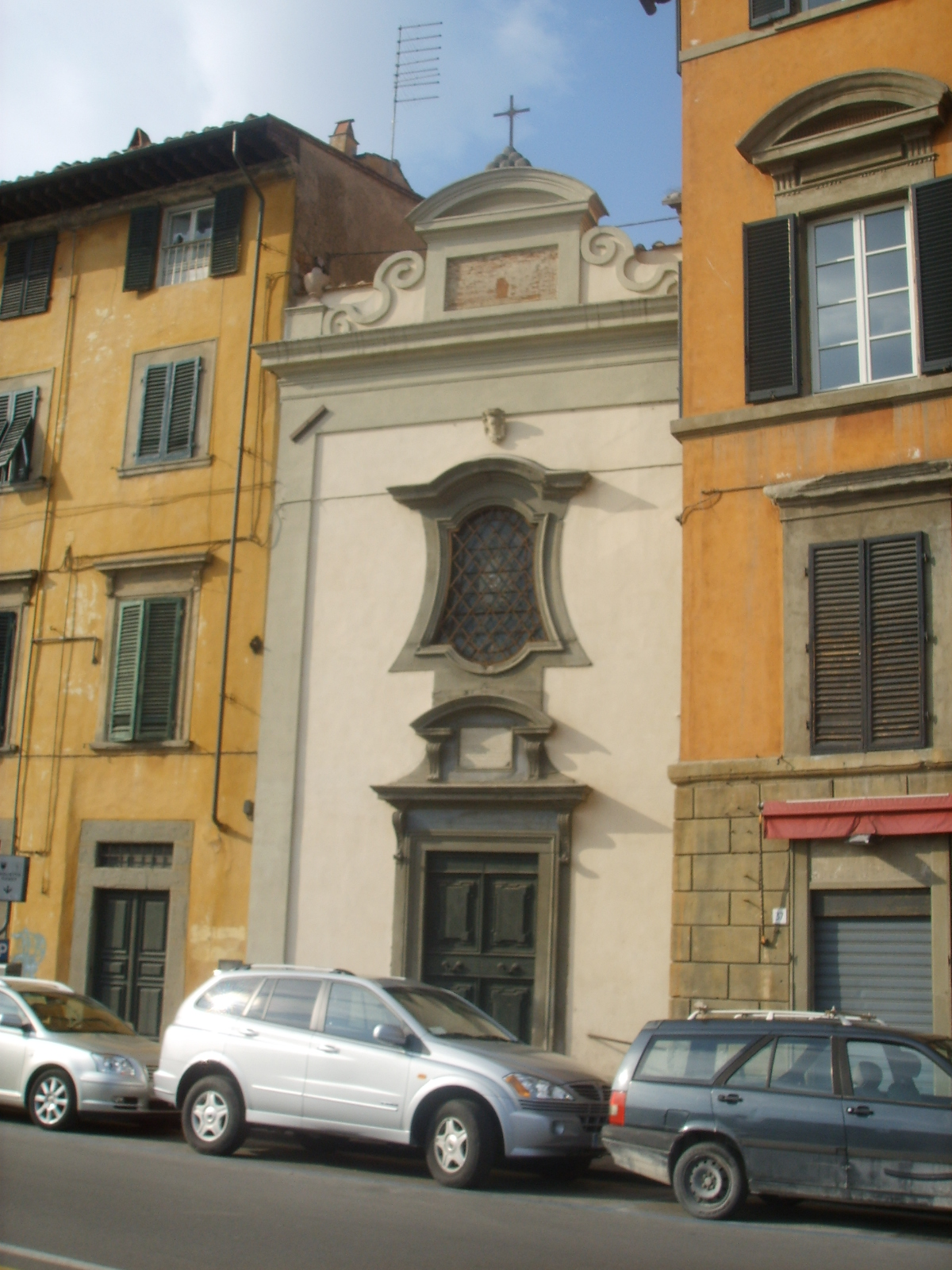 Chiesa_della_Madonna_dei_Galletti